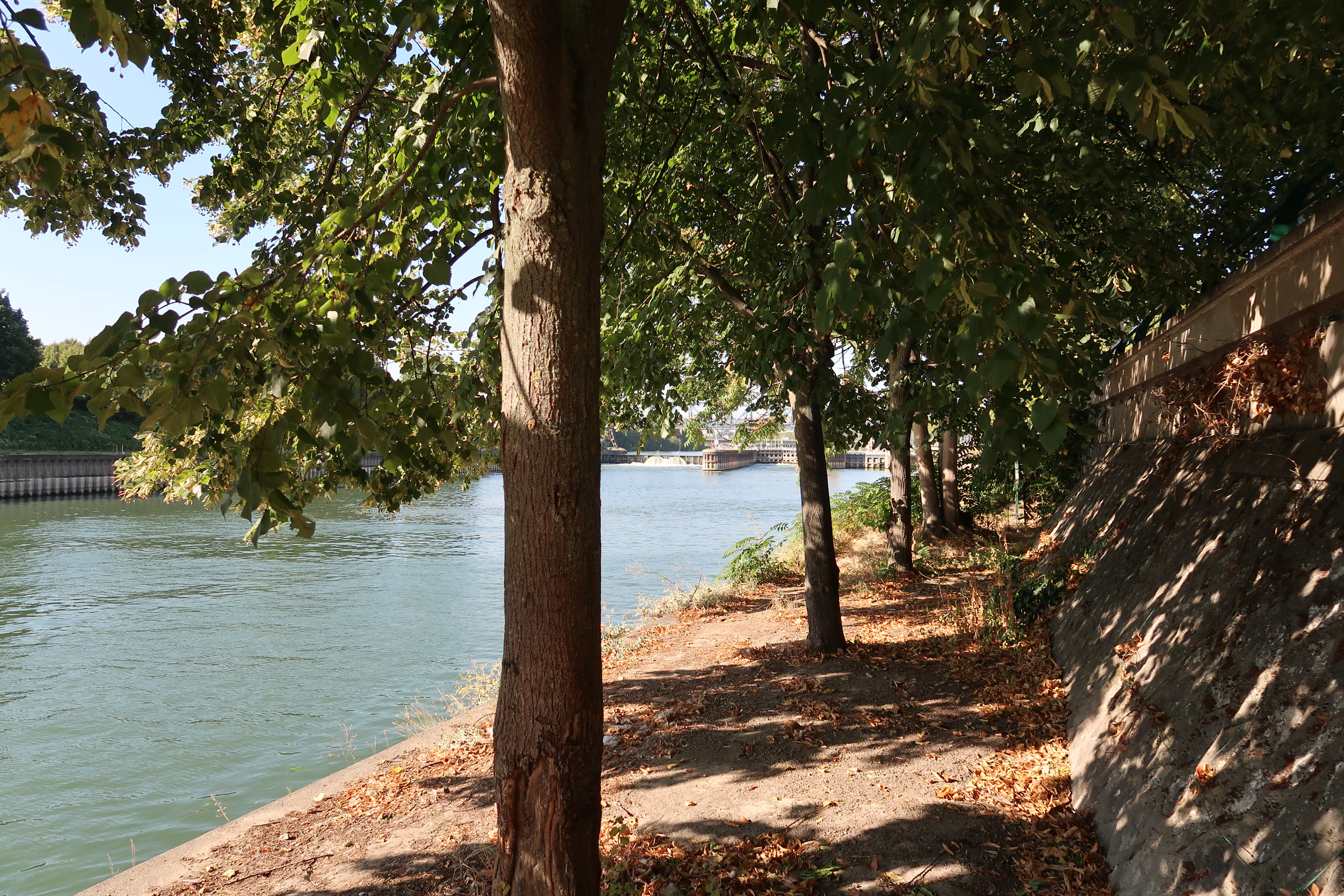 Quais de Suresnes (Hauts-de-Seine).